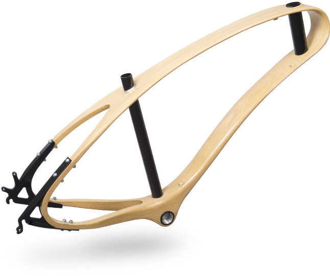 Přes čtyřicet vstev dřeva tvoří tento precizně tvarovaný rám podobný avokádu. Pevnost a pružnost dosažené díky celistvé konstrukci a díky vysoké únavové životnosti dřeva.